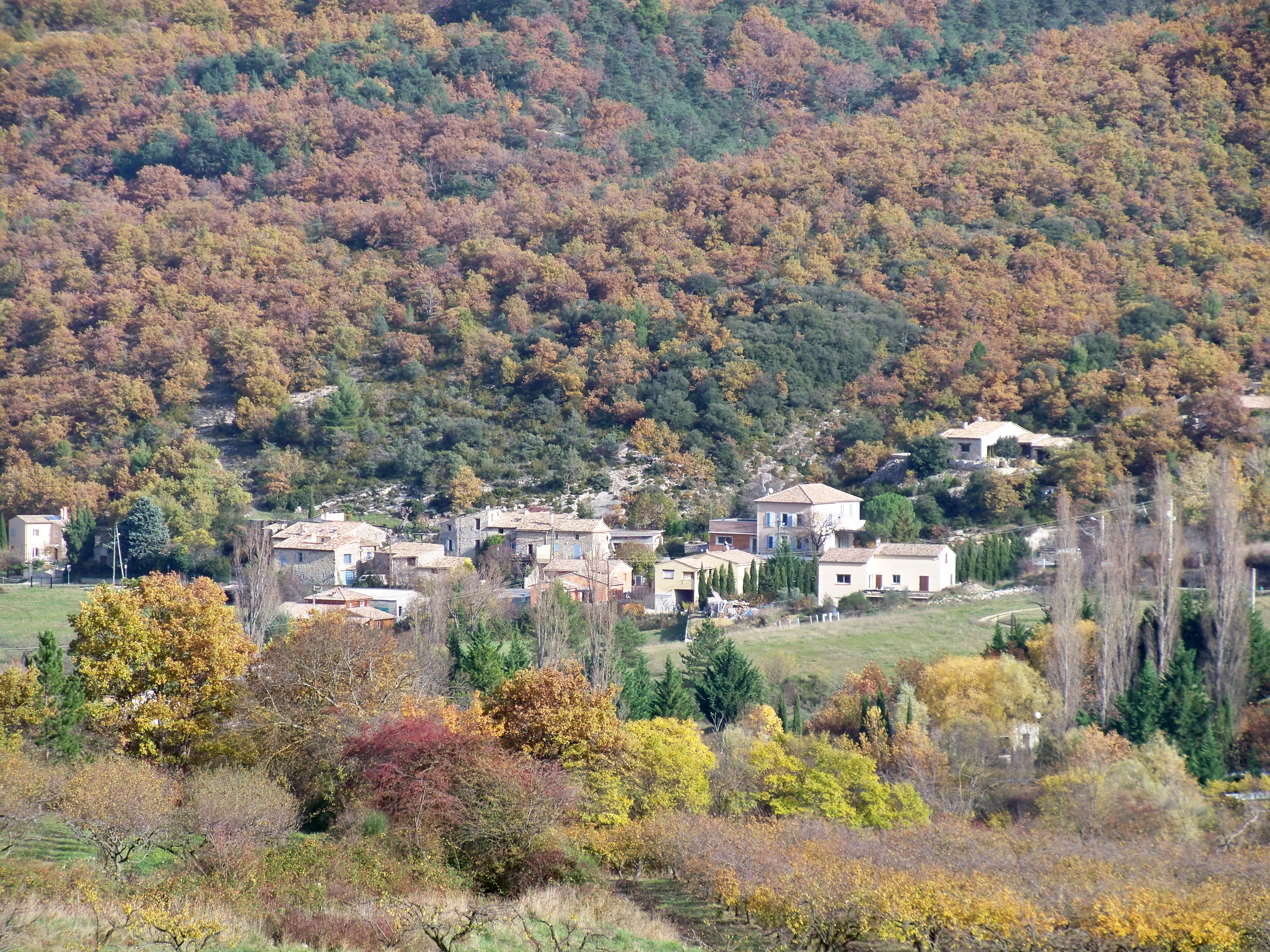 village de Chateauneuf de Bordette